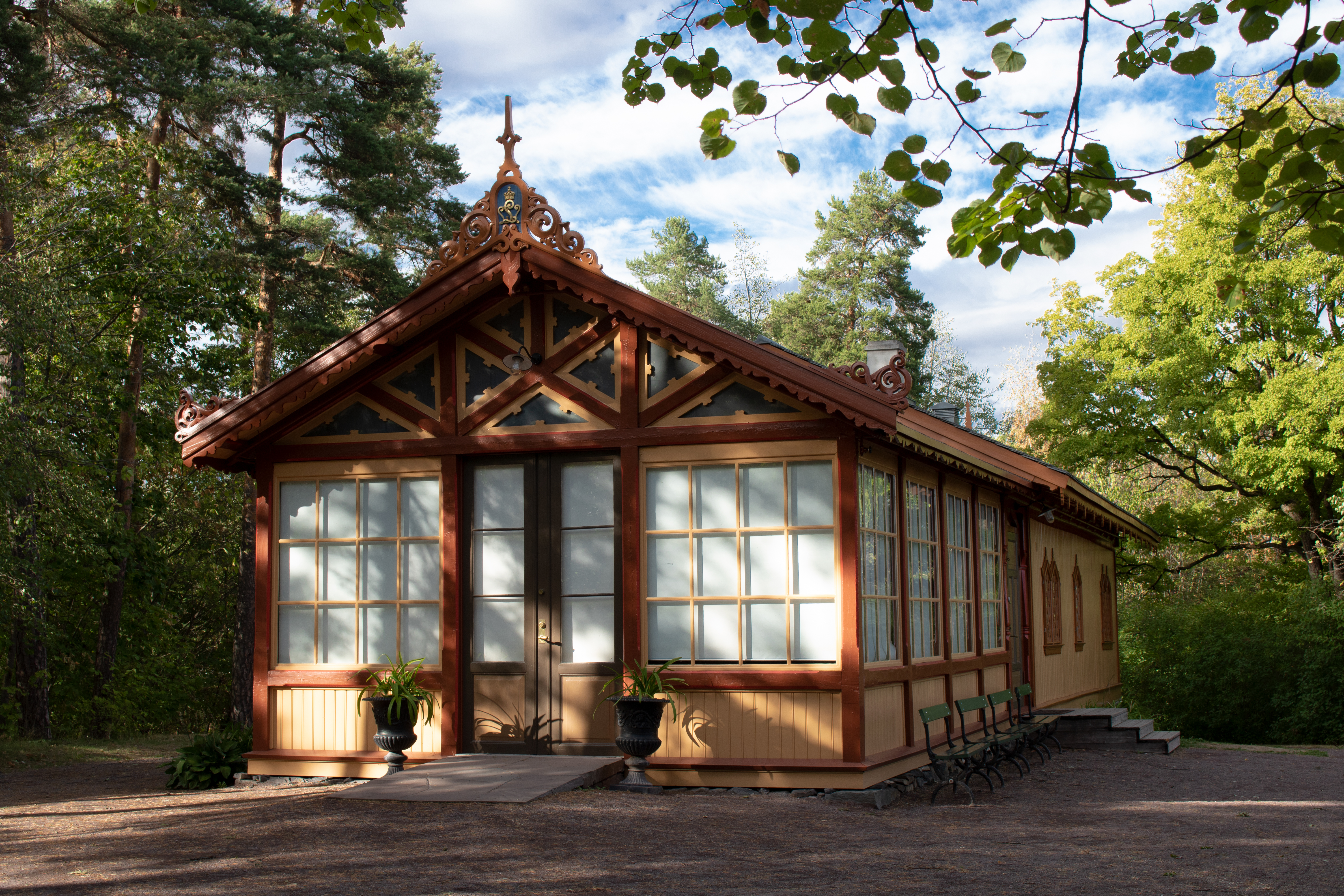 Seterhytten på Dronningberget, Oslo, Bygdøy, 2018